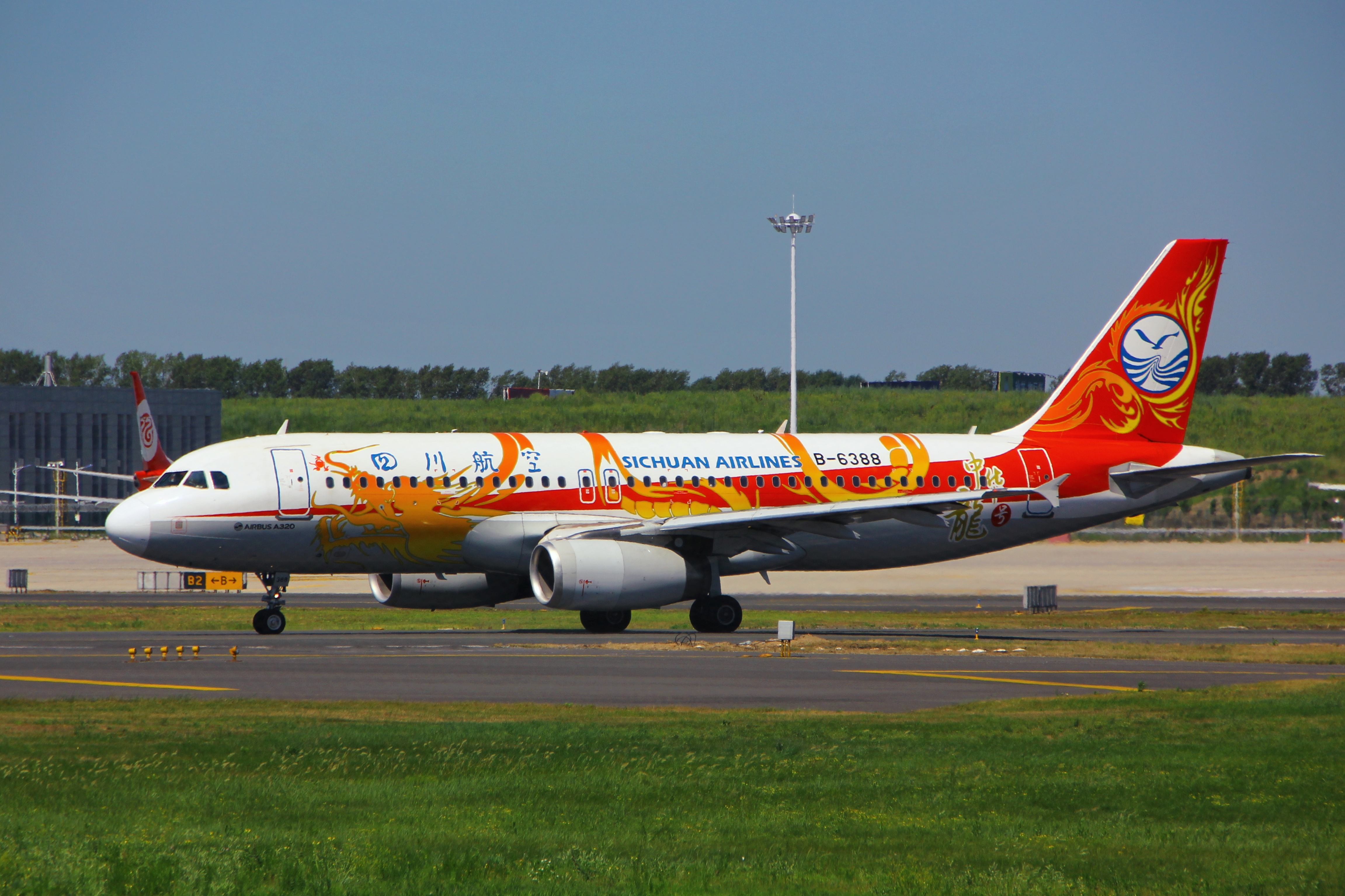 中文（中国大陆）: 四川航空A320(B-6388)在哈尔滨太平机场